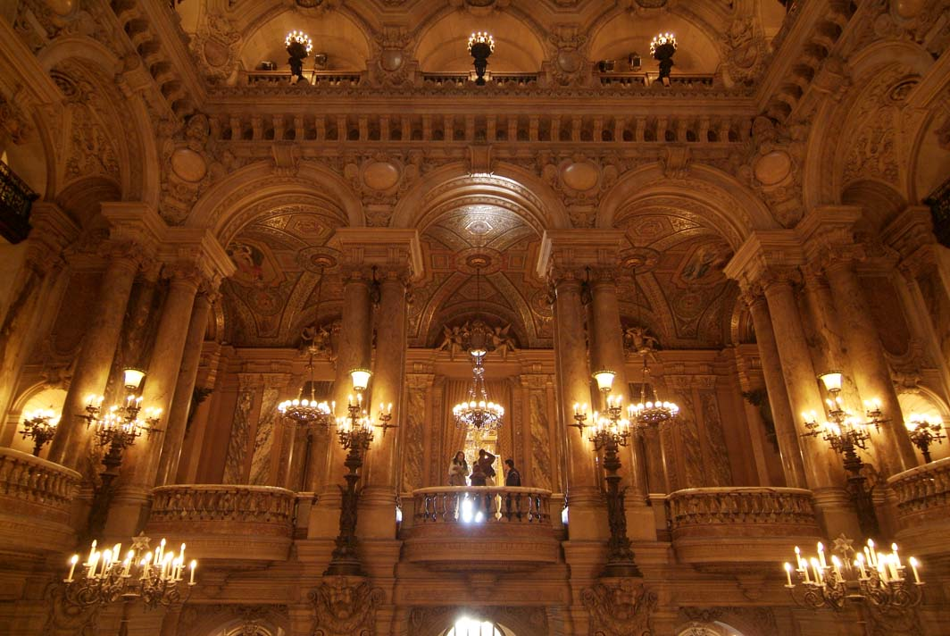 Opéra National de Paris (Palais Garnier) Paris, France